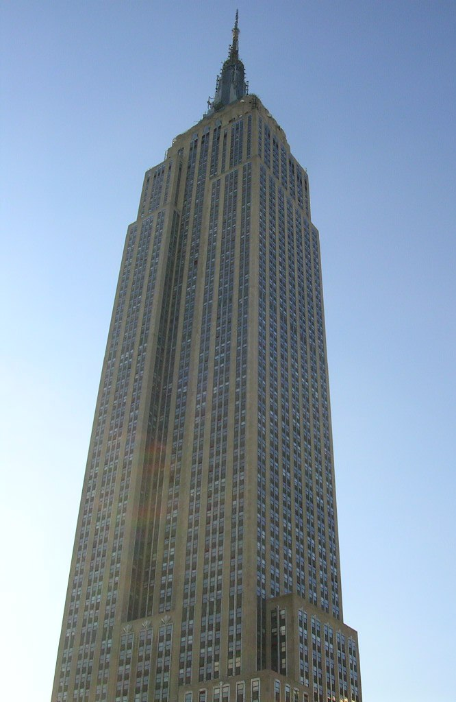 Empire State Building in New York City